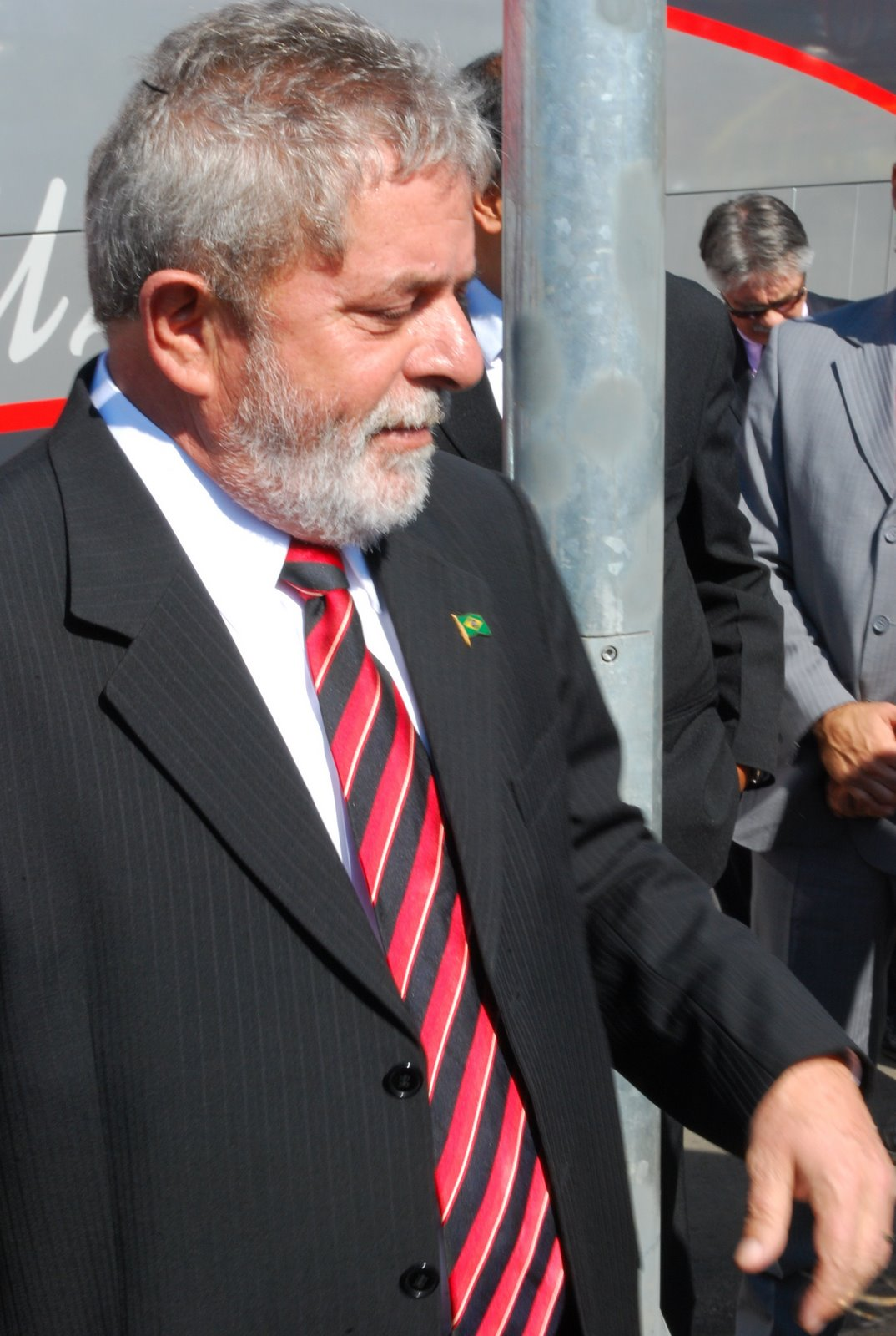 Presidente Lula durante inauguração de unidade de produção de propeno na Refinaria de Paulínia, São Paulo.